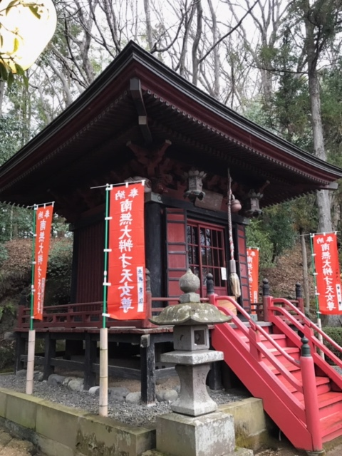 妙圓寺弁天堂